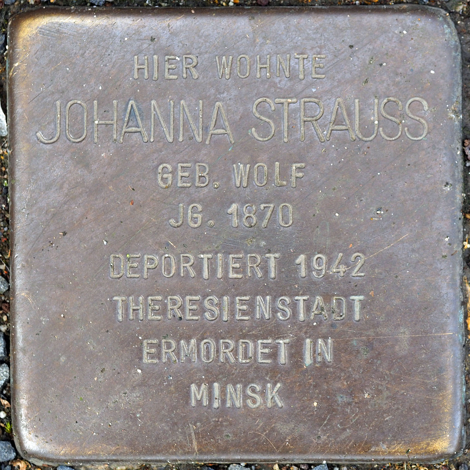 Stolpersteine MG: Strauss, Johanna